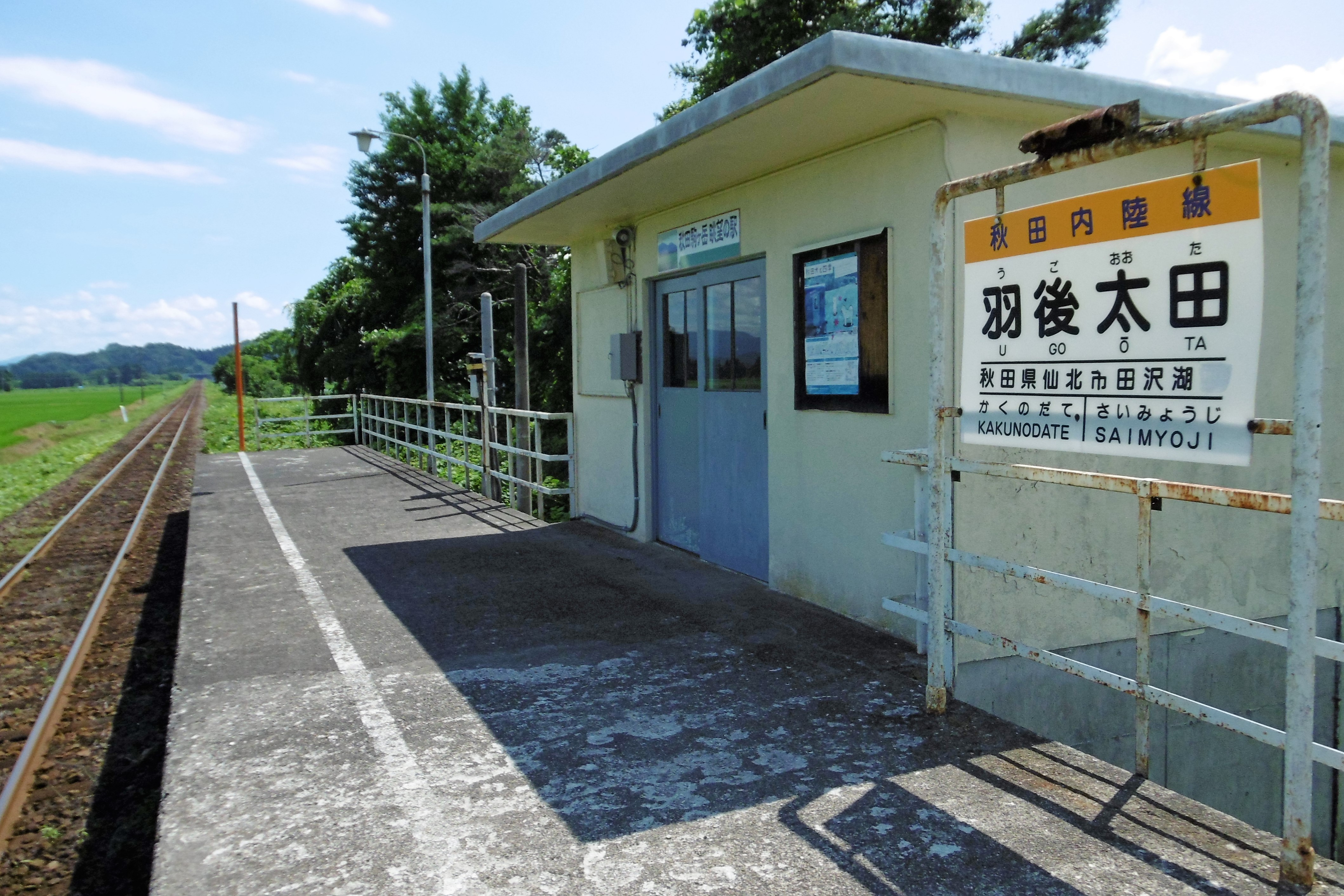 秋田内陸縦貫鉄道・羽後太田駅：秋田県仙北市田沢湖